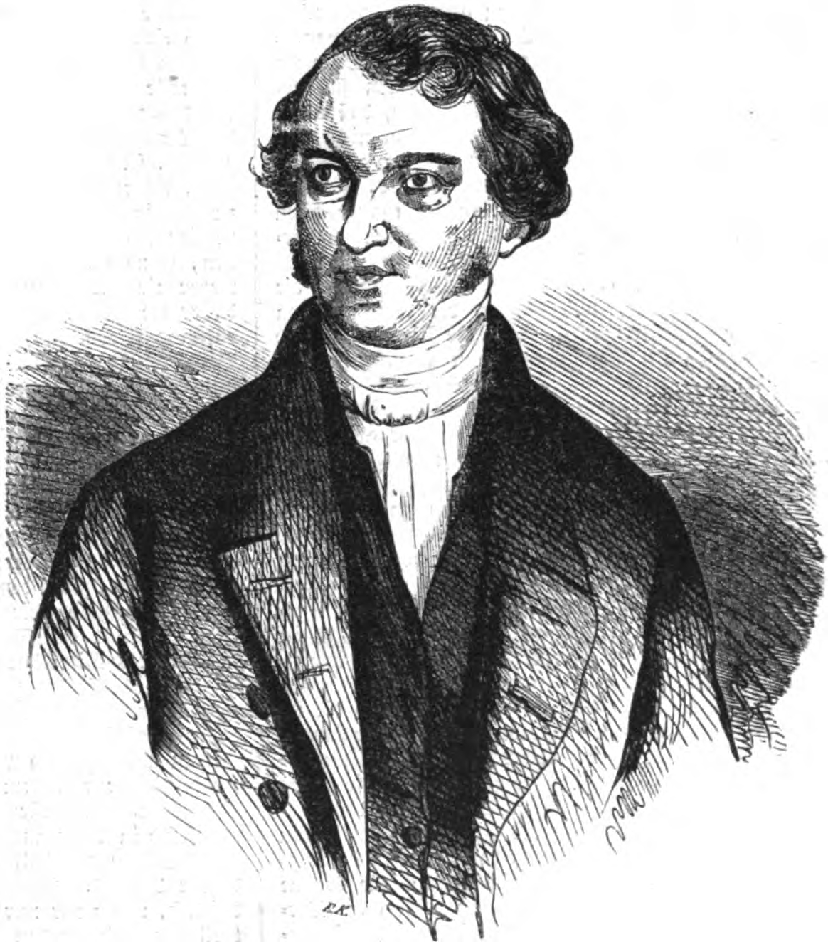 Karl Zimmermann, deutscher Theologe, 1844.